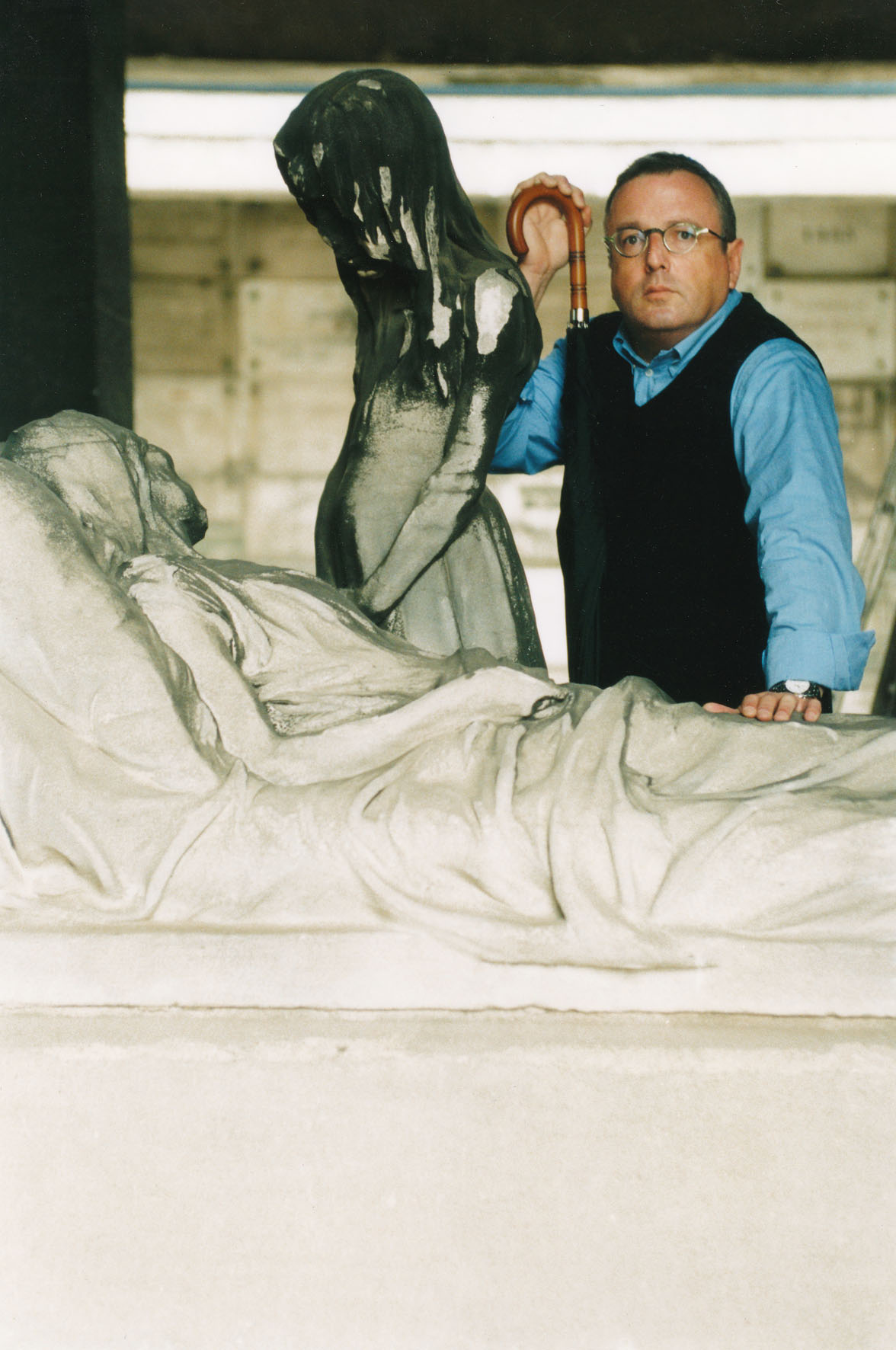 André (Dré) Steemans, pseudoniem Felice Damiano, Vlaams tv-presentator.